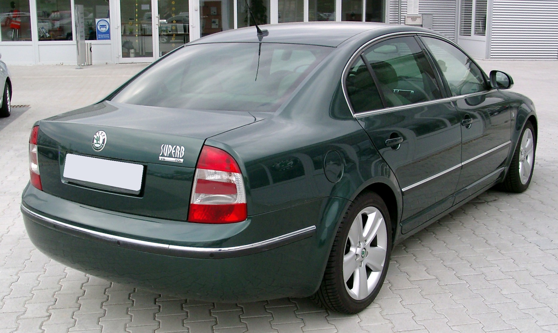 Škoda Superb, 1. Generation